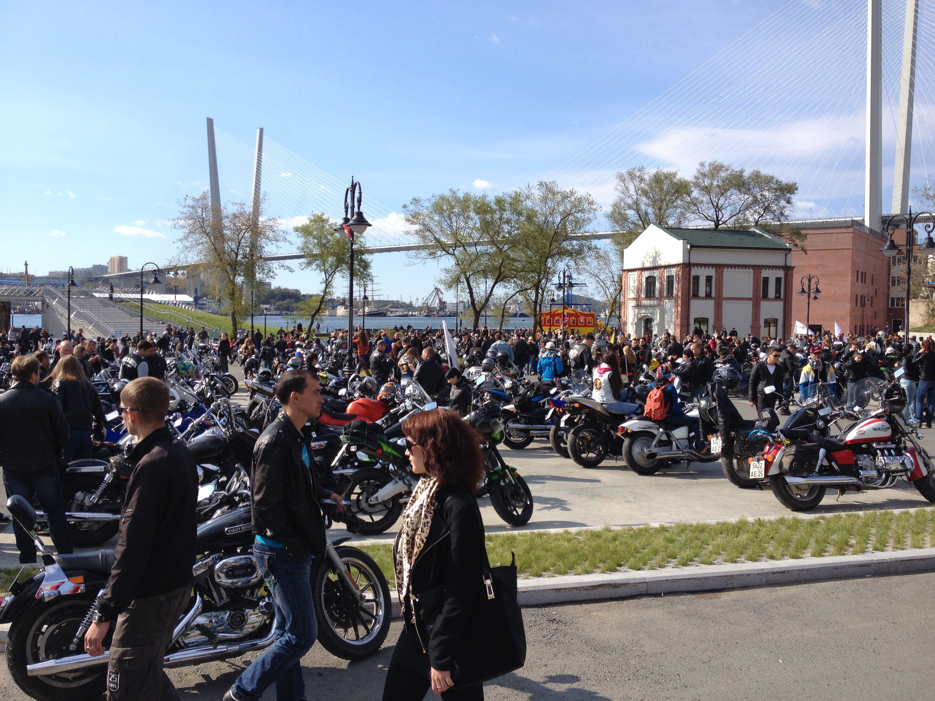 Закрытие байкерского сезона 2013 во Владивостоке.